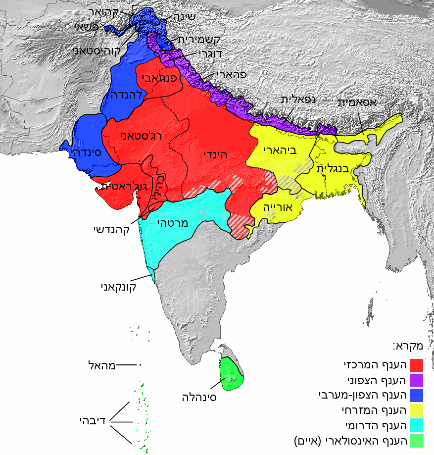 Indoaryan languages